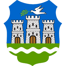 Wappen von Novi Sad